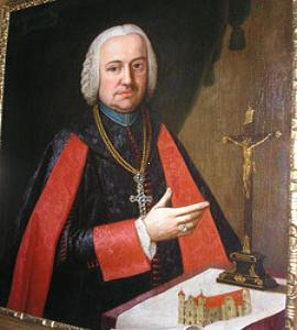 Franz Anton Engl Graf von Wagram, Bischof von Temeswar